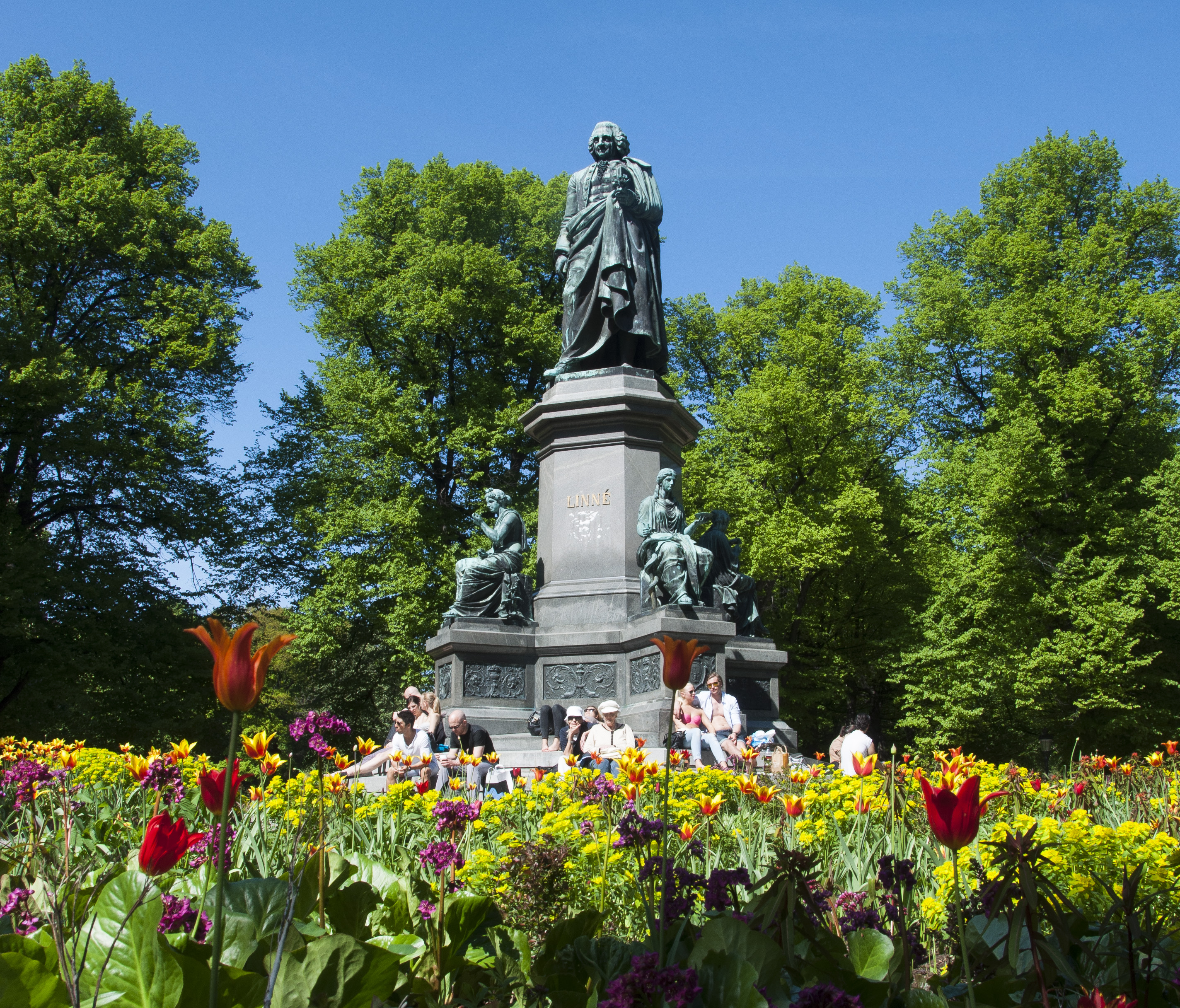 Linnémonumentet. Avtäckt de 13 maj 1885. Fritjof Kjellbergs bronsstaty över Carl von Linné (1707-1778).